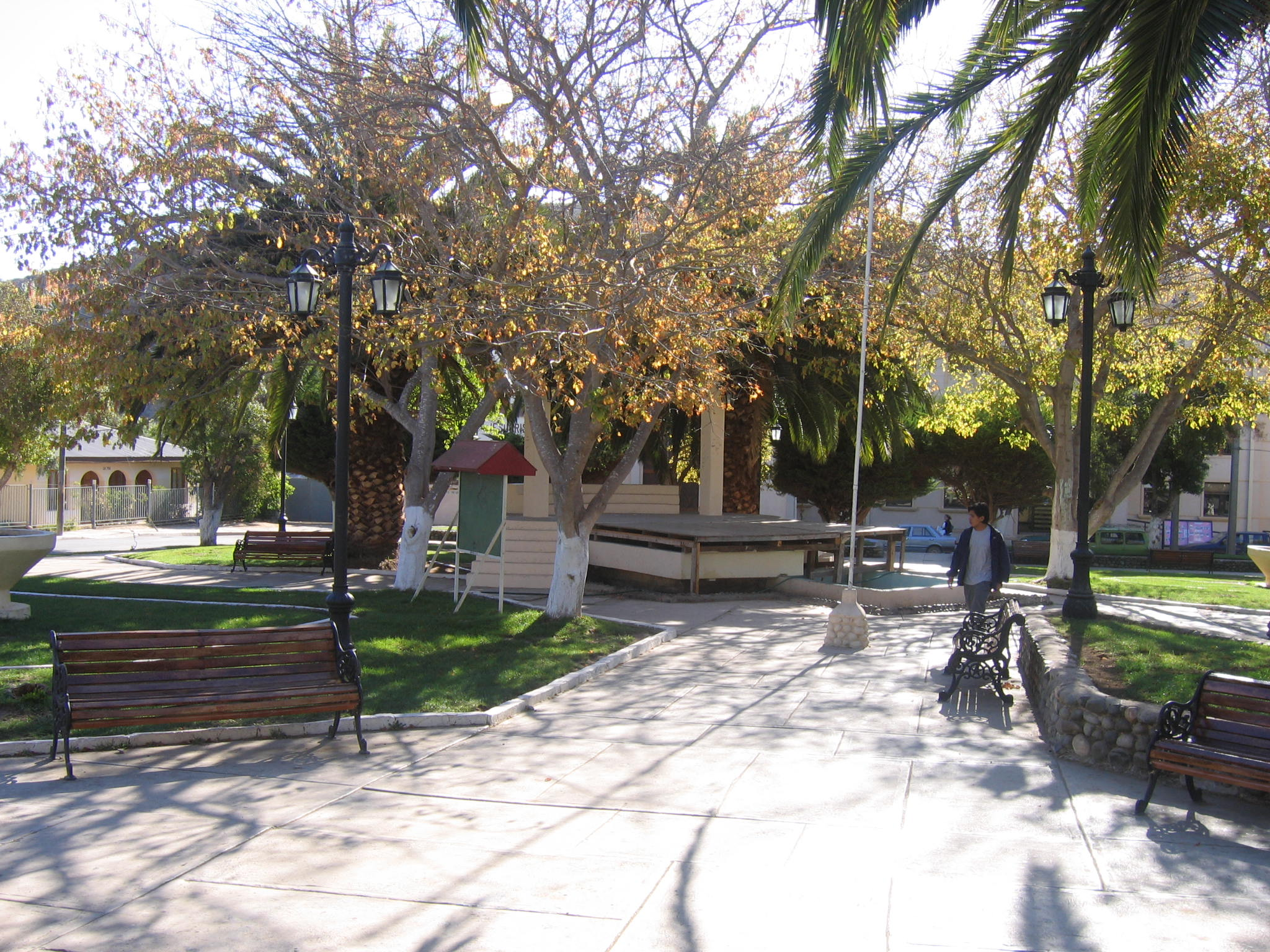 Foto de la plaza de Canela un día de vereno